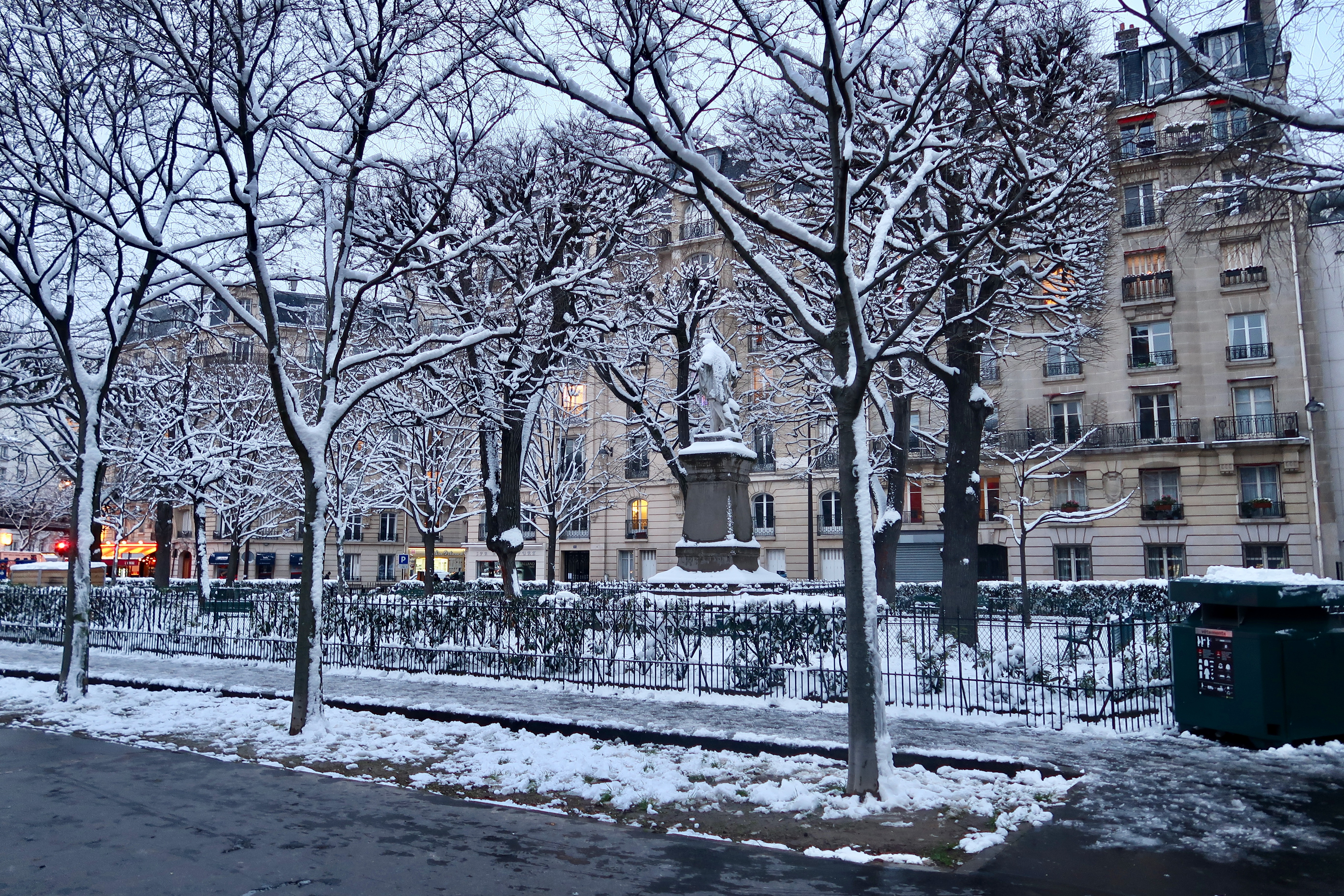 Square Garibaldi sous la neige (Paris, 15e).